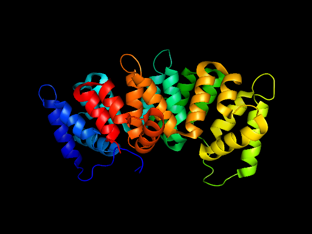 Annexin II strucure PDB